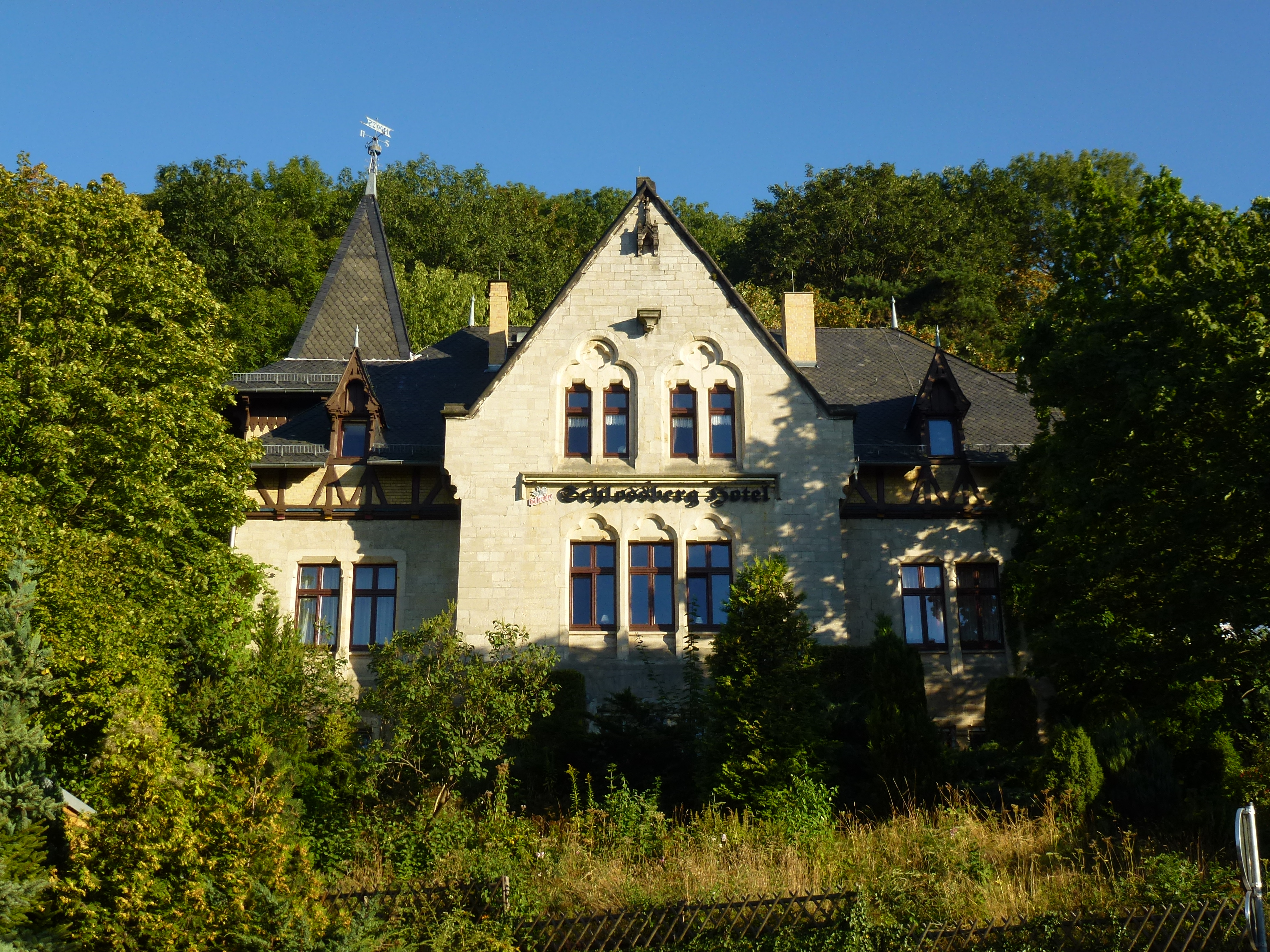 Villa am Burgberg 9a in Wernigerode, 1875 als Wohnhaus für Carl Frühling errichtet. Später wurde das Haus als Berufsschule, Wehrkreiskommando und Kindergarten genutzt, seit 1999 Hotelbetrieb.